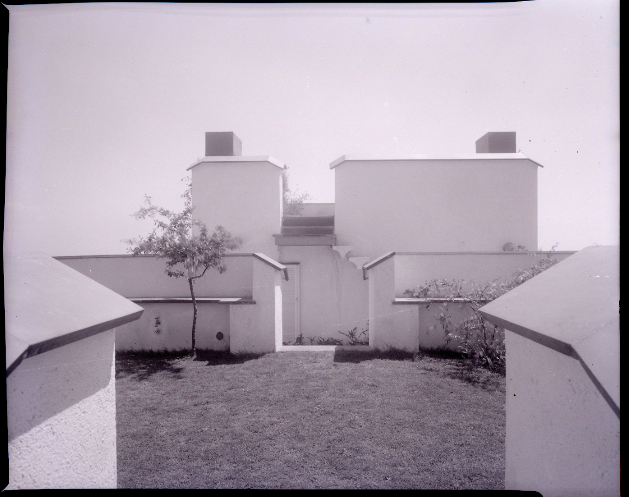 Servizio fotografico : Arenzano, 1959 / Paolo Monti. - Buste: 34, Fototipi: 37 : Negativo b/n, gelatina bromuro d'argento/ pellicola ; 10x12. - ((Serie costituita da 34 buste di negativi identificati con i nn.: 3551, 3552, 3553, 3554, 3555, 3556, 3557, 3558, 3559, 3560, 3561, 3562, 3563, 3564, 3565, 3566, 3567, 3568, 3569, 3570, 3571, 3572, 3573, 3574, 3575, 3576, 3577, 3578, 3579, 3580, 3581, 3582, 3583, 3584, 3585, 3586, 3587, e tenute insieme da una graffetta. - Le buste sono numerate da 47 a 81. - Sulla busta identificata con il n. 3551 iscrizione didascalica manoscritta a pennarello. - Rubrica di Paolo Monti: Archivio 10x12 (ultimi numerati) - dal G1 al (s.d.), presso Archivio Paolo Monti. - Fonte: Quaderno ad anelli di Paolo Monti: s.t. [Soggetti e committenti] (1956-1961), presso Archivio Paolo Monti. - Fonte